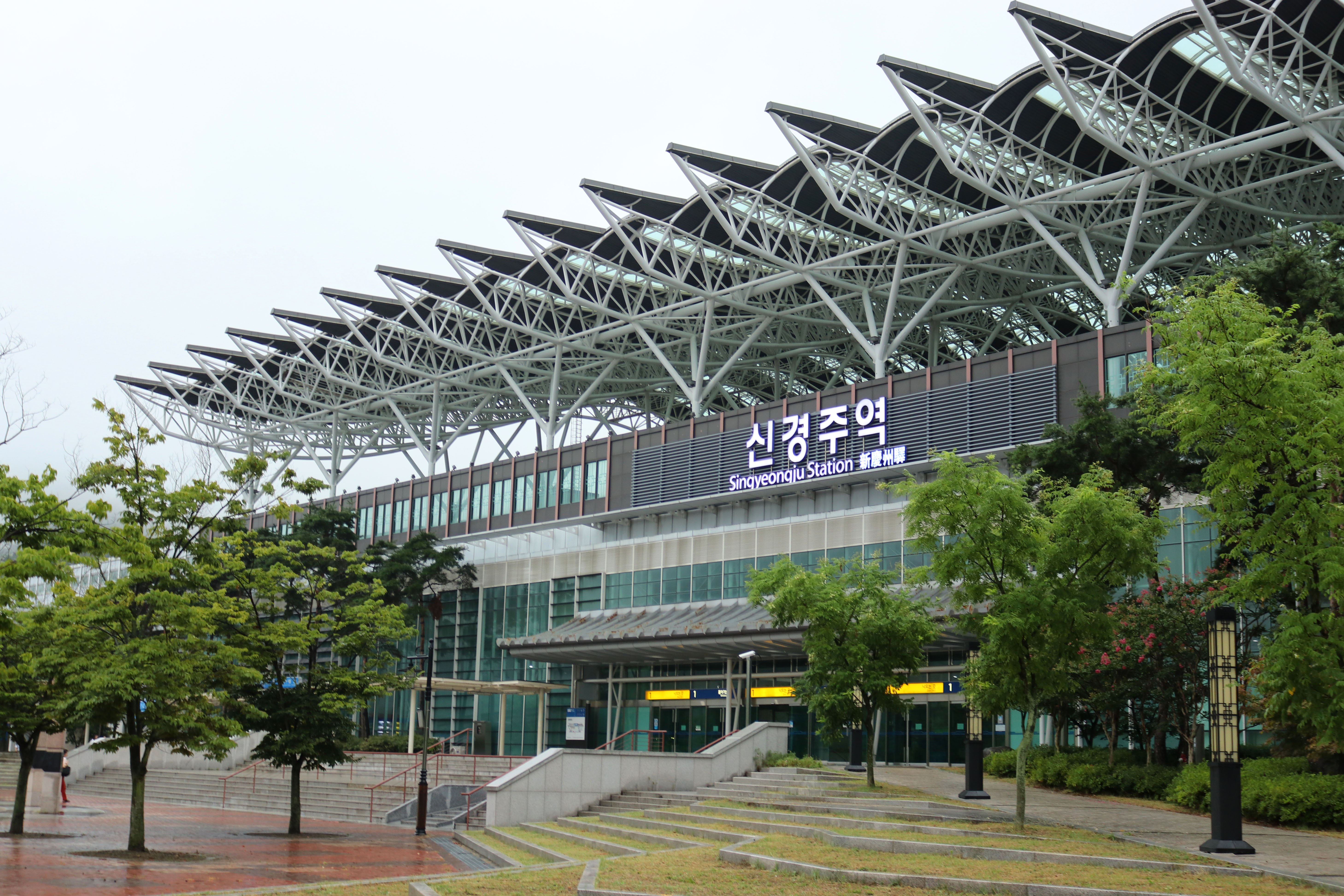 신경주역 역사